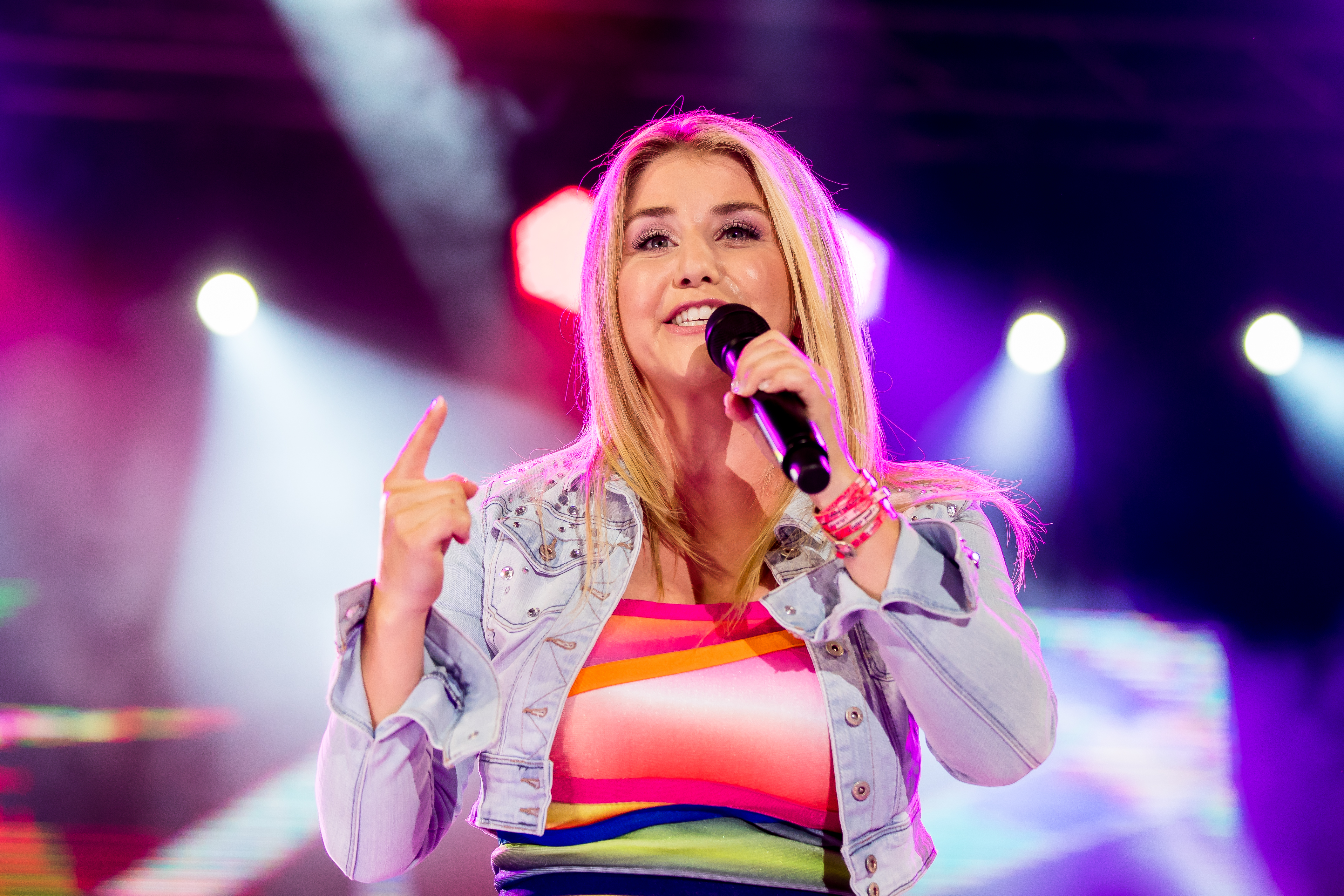 Beatrice Egli during SWR4 Schlagernacht mit Jürgen Drews, Beatrice Egli, Vanessa Mai, Nik P. und Mitch Keller at Technik Museum Speyer, Speyer, Rheinland Pfalz, Germany on 2016-07-24, Photo: Sven Mandel